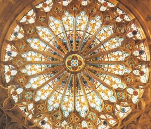 Rosette in der Zisterze von Ebrach